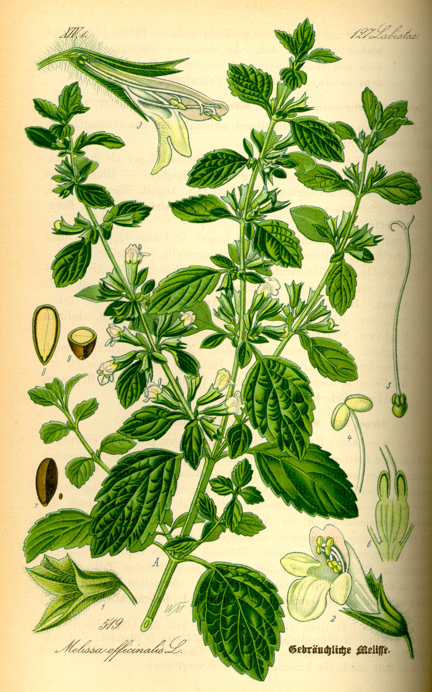 Melissa officinalis, Family: Labiatae, from Flora von Deutschland Österreich und der Schweiz, Gera 1885